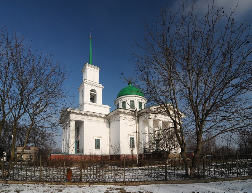 Троїцька церква в Гельмязові (1841 р.). Пізній класицизм.